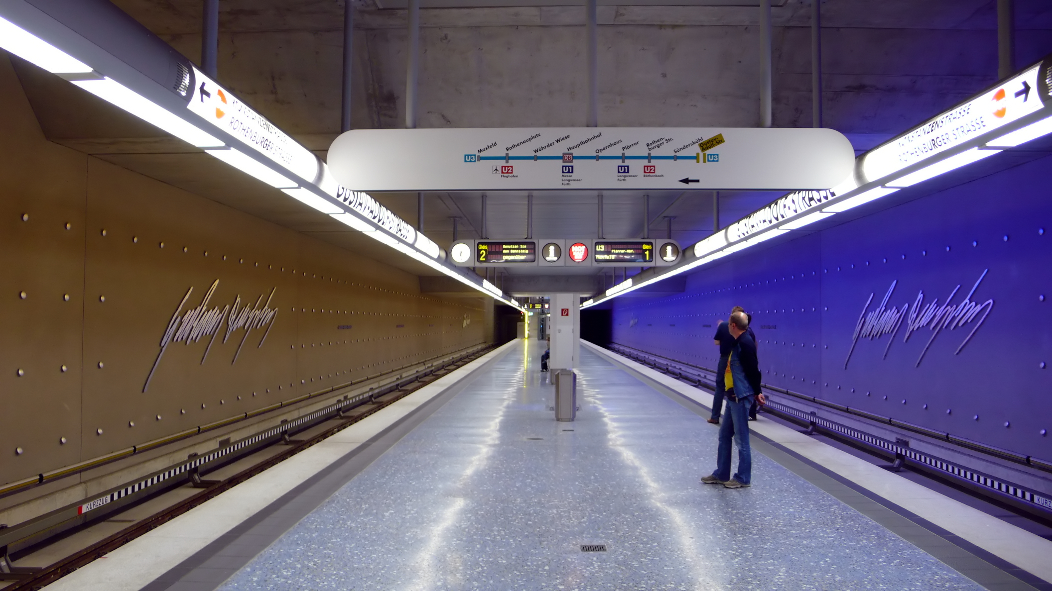 U-Bahnhof Gustav-Adolf-Straße der U-Bahn Nürnberg, Bahnsteigebene, Blick von Osten